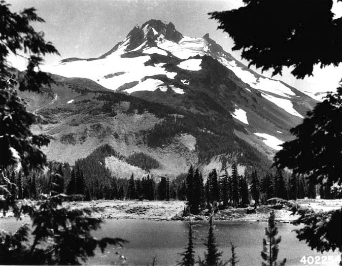 Mt. Jefferson from Russell Lake.